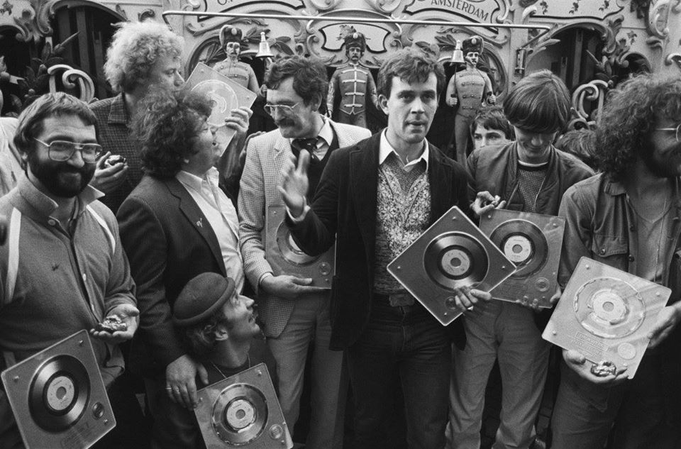 Coen van Vrijberghe de Coningh samen met Drukwerk en Andre Hazes op 2 maart 1982.